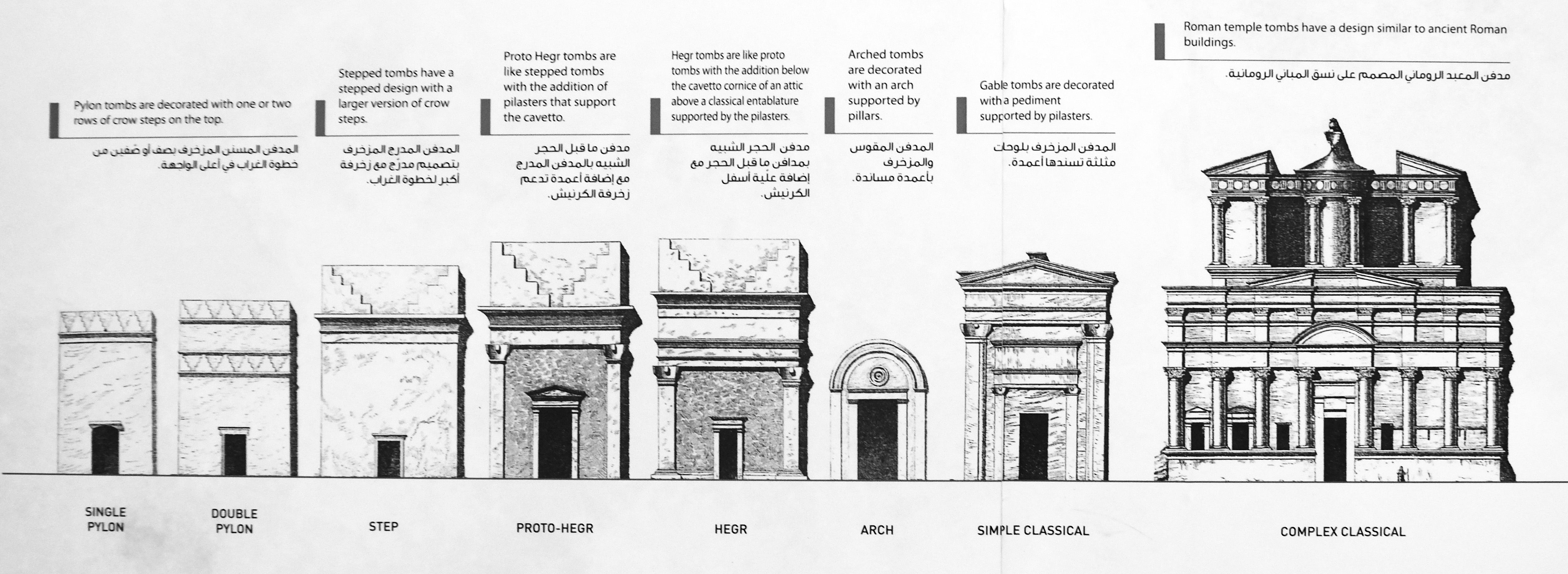 Classificazione architettura nabatea